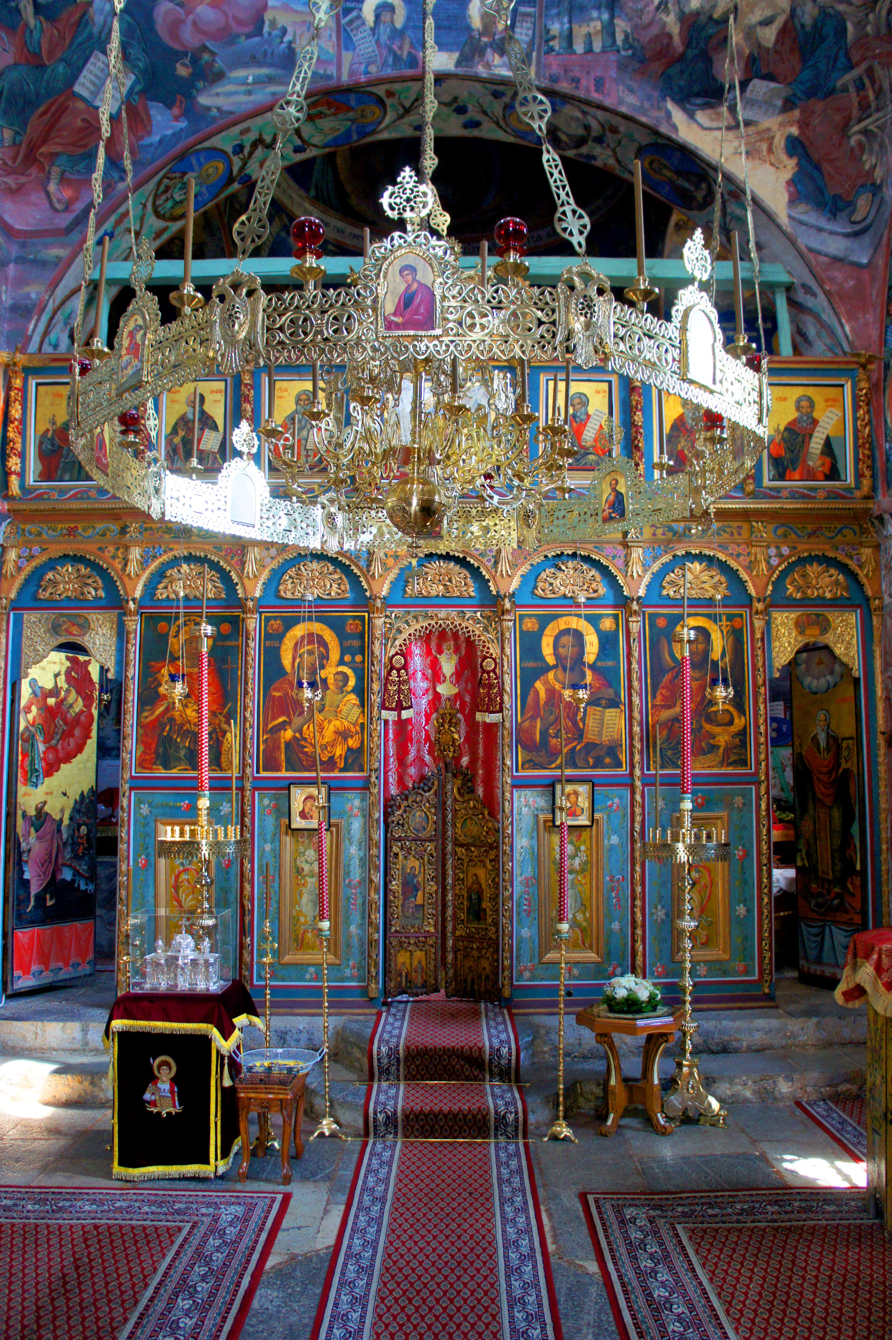 Внатреноста на црквата „Св. Ѓорѓи Победоносец“ - Рајчица